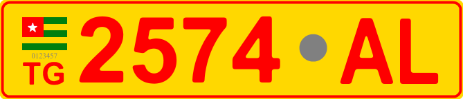 Схематичне зображення номерного знаку